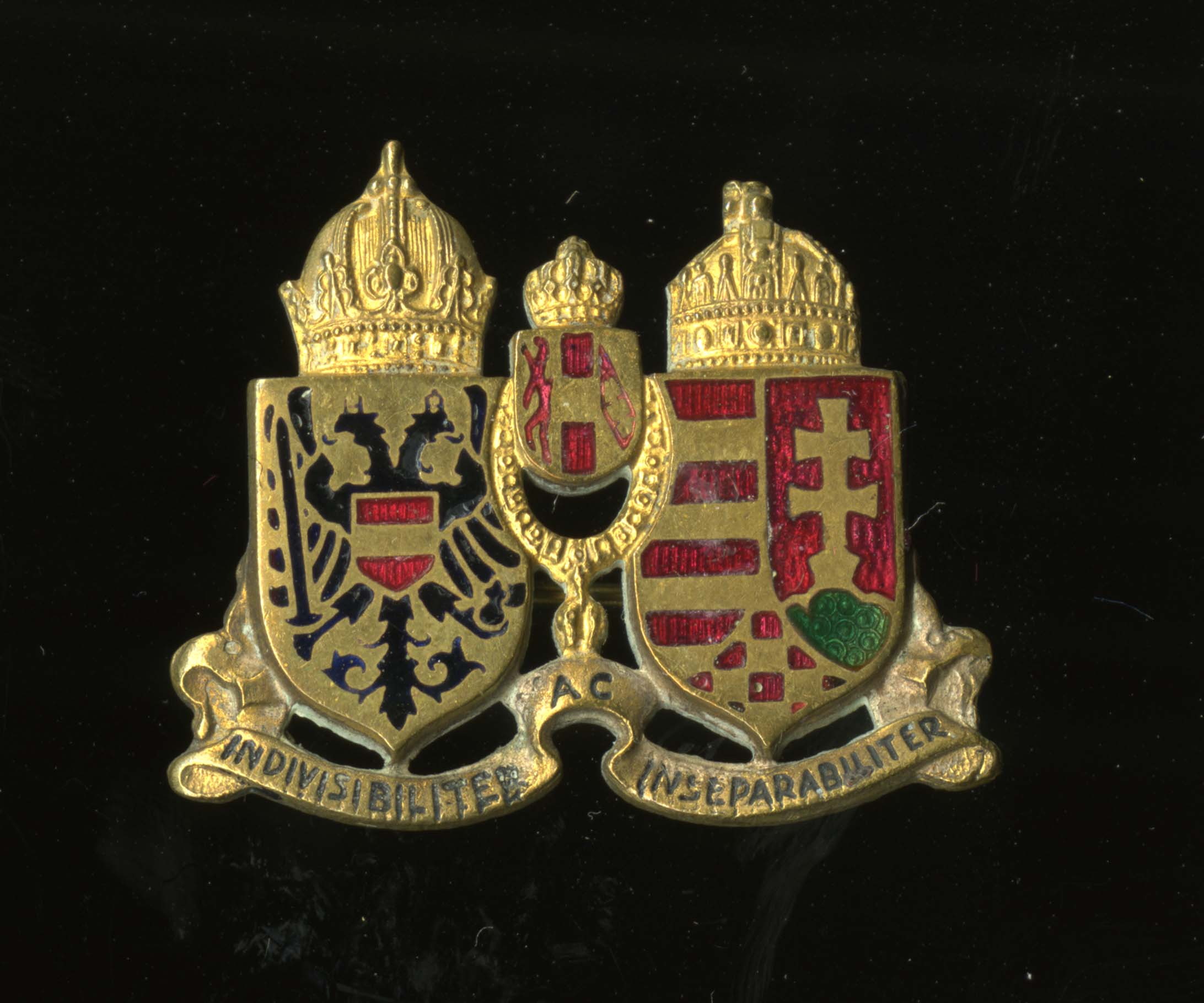 Kappenabzeichen, distintivo da berretto austro-ungarico della collezione del Museo Storico Italiano della Guerra di Rovereto